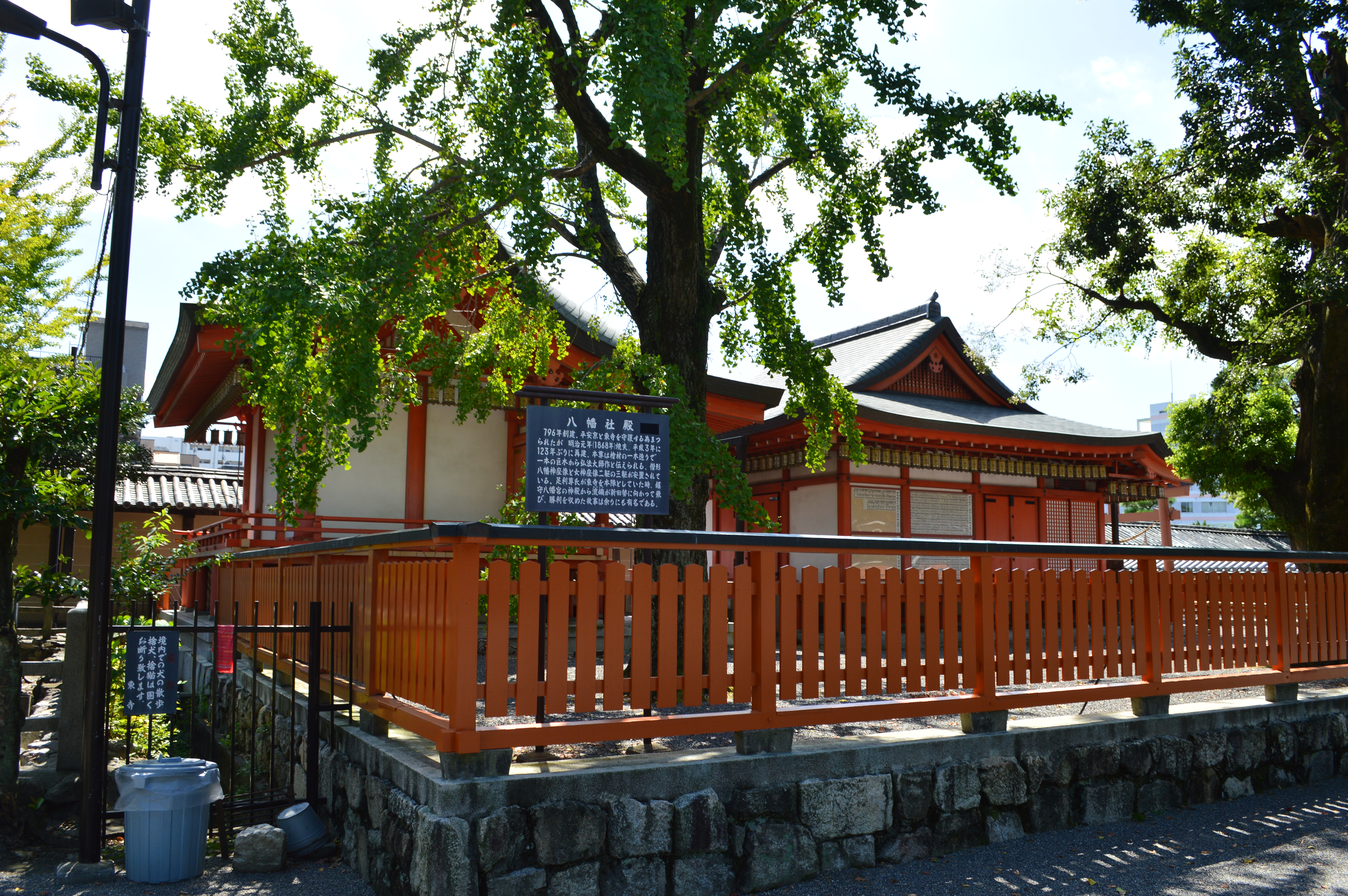 東寺 八幡神社